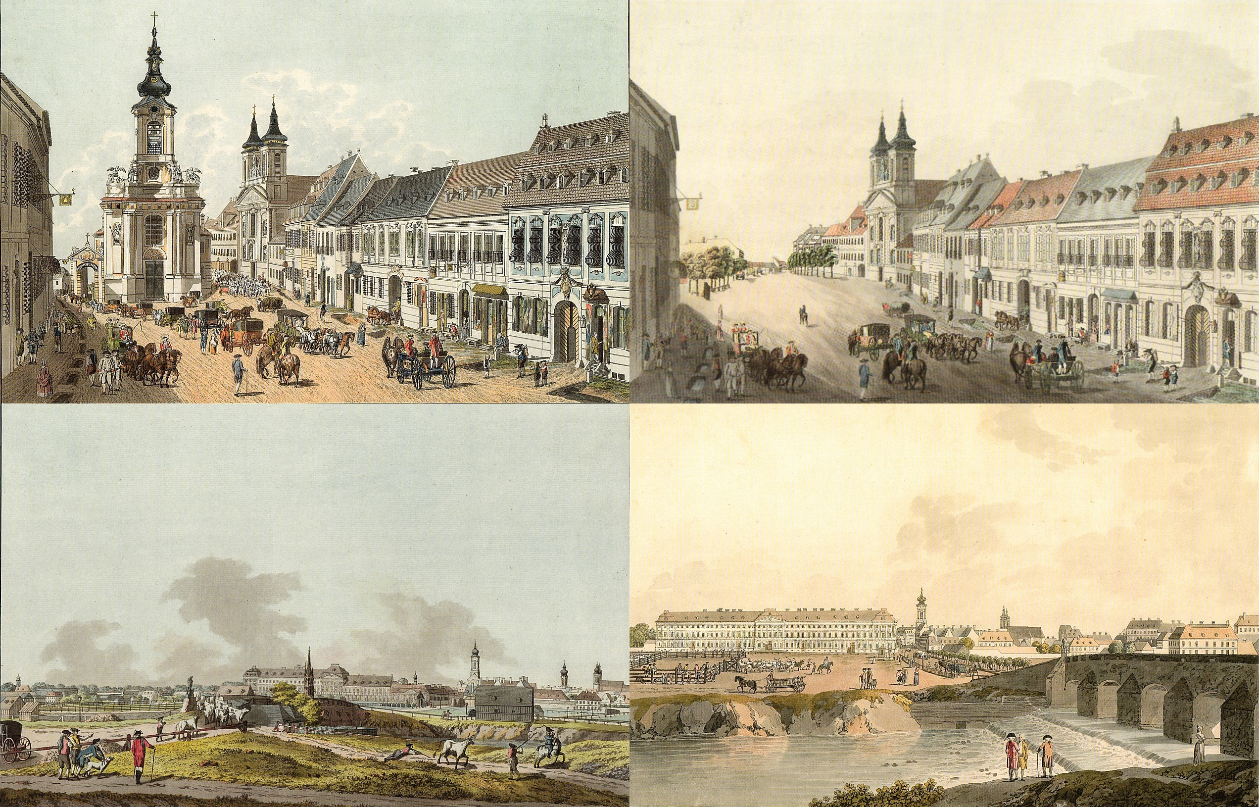 Vier Blätter aus den Wien-Ansichten des Verlags Artaria dokumentieren den Abriss der Nikolaikirche an der Stelle des heutigen Rochusmarktes in Wien-Landstraße im Jahr 1784: Links oben: Die Pfarrkirche und Gottesacker auf der Landstraße. 1. Etat 1783: Die Nikolaikirche steht prominent links im Bild. Rechts oben: Die Augustiner Pfarrkirche. 2. Etat dieser Ansicht, um 1805. An Stelle der abgerissenen Nikolaikirche ist eine leere Straße mit einigen Alleebäumen zu sehen. Links unten: Ansicht gegen die Landstraße. 1780. Das Invalidenhaus in der Bildmitte ist noch nicht fertiggestellt, rechts sind die Kirchtürme von Elisabethinenkirche, Nikolaikirche und Rochuskirche zu erkennen. Rechts unten: Ansicht des neuen Invaliden-Hauses am anfang der Landstraße. 1. Etat 1792: Das Invalidenhaus ist fertiggestellt, der Kirchturm der Nikolaikirche ist verschwunden.